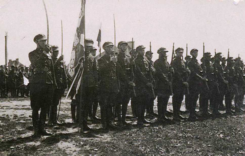 Poczet sztandarowy 79pp pod dowództwem sierż.Jana Widlickiego w czasie obchodów Święta Konstytucji 3 Maja. Koniec lat 20- stych.